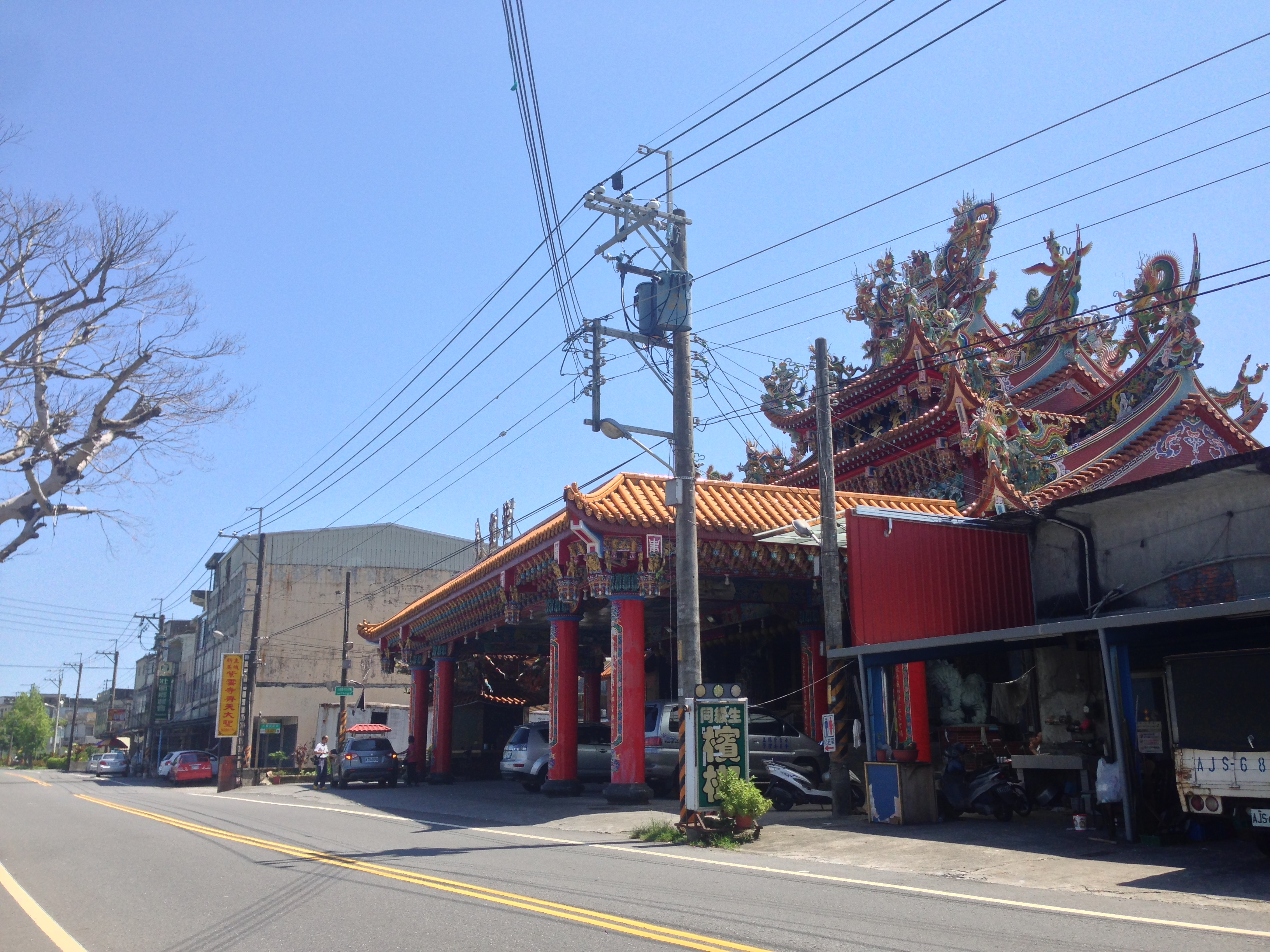 中文（台灣）: 五間紫雲寺一景